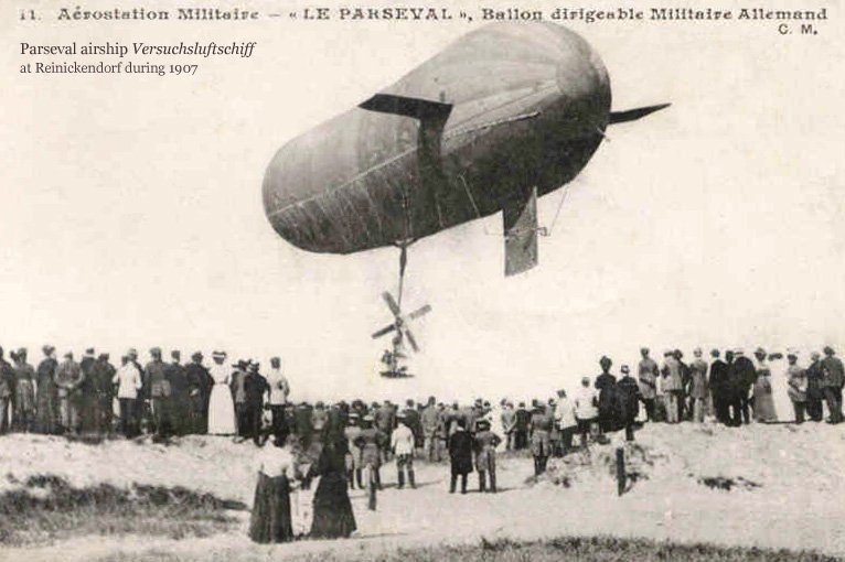 Public domain aus der Jean-Pierre Lauwers-sammlung.